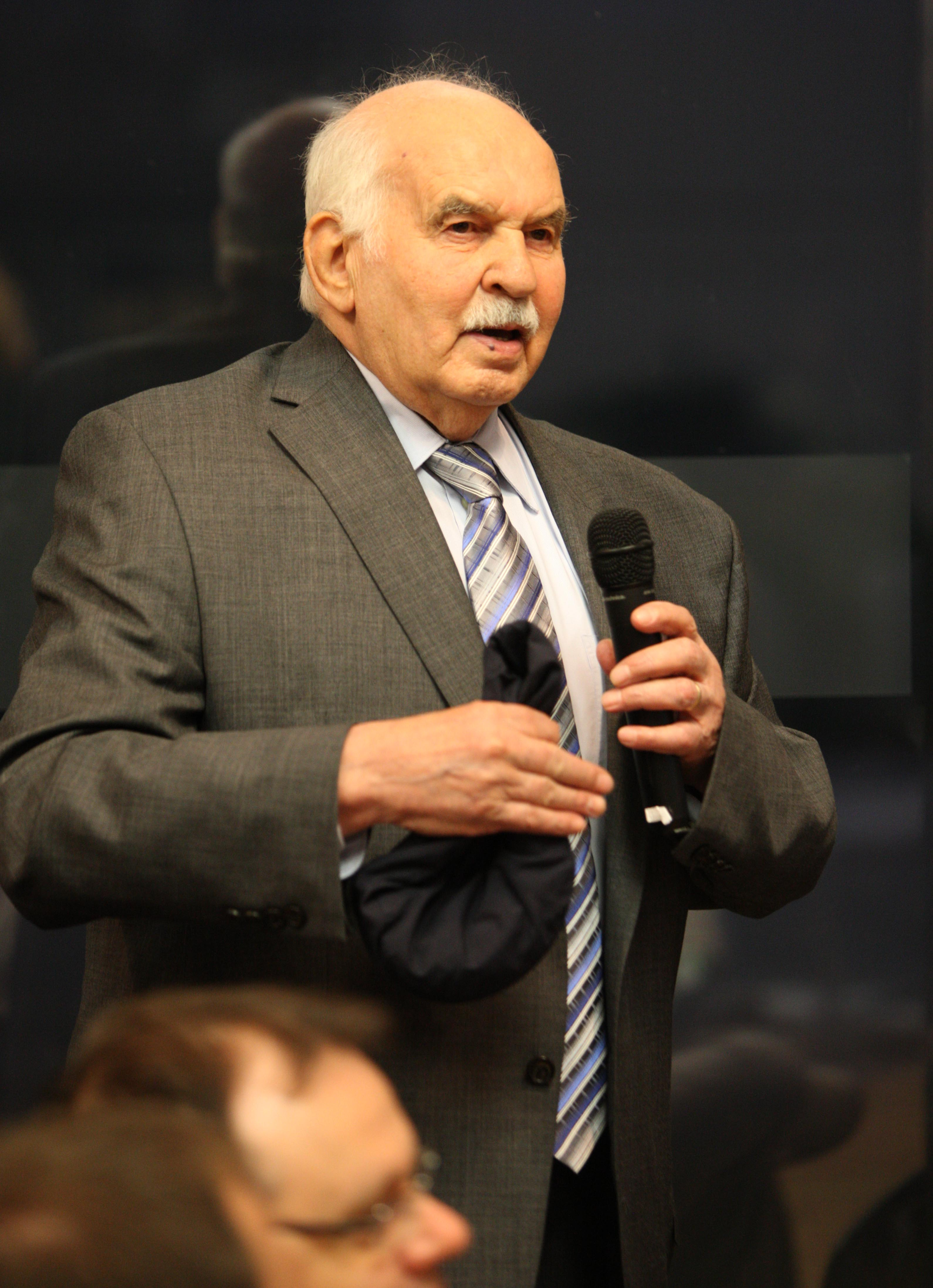 Horváth János az Országgyűlés korelnöke is bekapcsolódik a beszélgetésbe. Fotó: Európai Bizottság/ Dudás Szabolcs